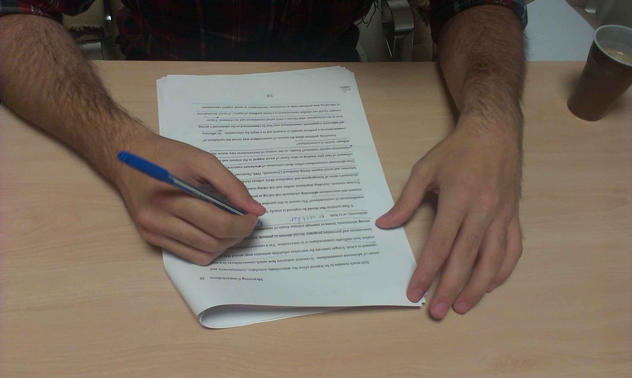 Za izboljšanje medkulturne komunikacije je pomembno predvsem učenje o drugih kulturah in značilnosti njihove komunikacije.